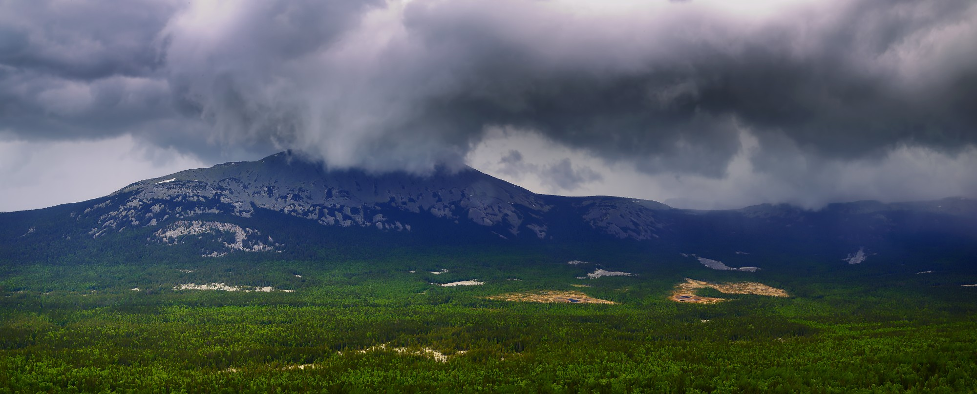 Непогода над Большим Иремелем. Вид со Среднего Аваляка.